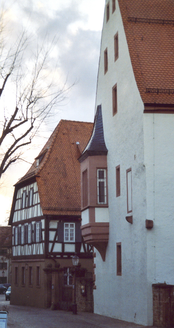 Buchen : Museumshof. Die ehemalige Kurmainzische Kellerei ist das bedeutendste Gebäudeensemble der Stadt. Die gut erhaltenen Bauwerke entstammen noch dem ausgehenden Mittelalter.